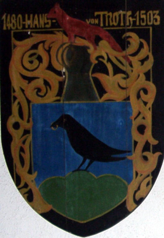 Wappen von Hans von Troth, zeigt einen Raben mit goldenem Ring im Schnabel. Fotografiert auf Burg Berwartstein.